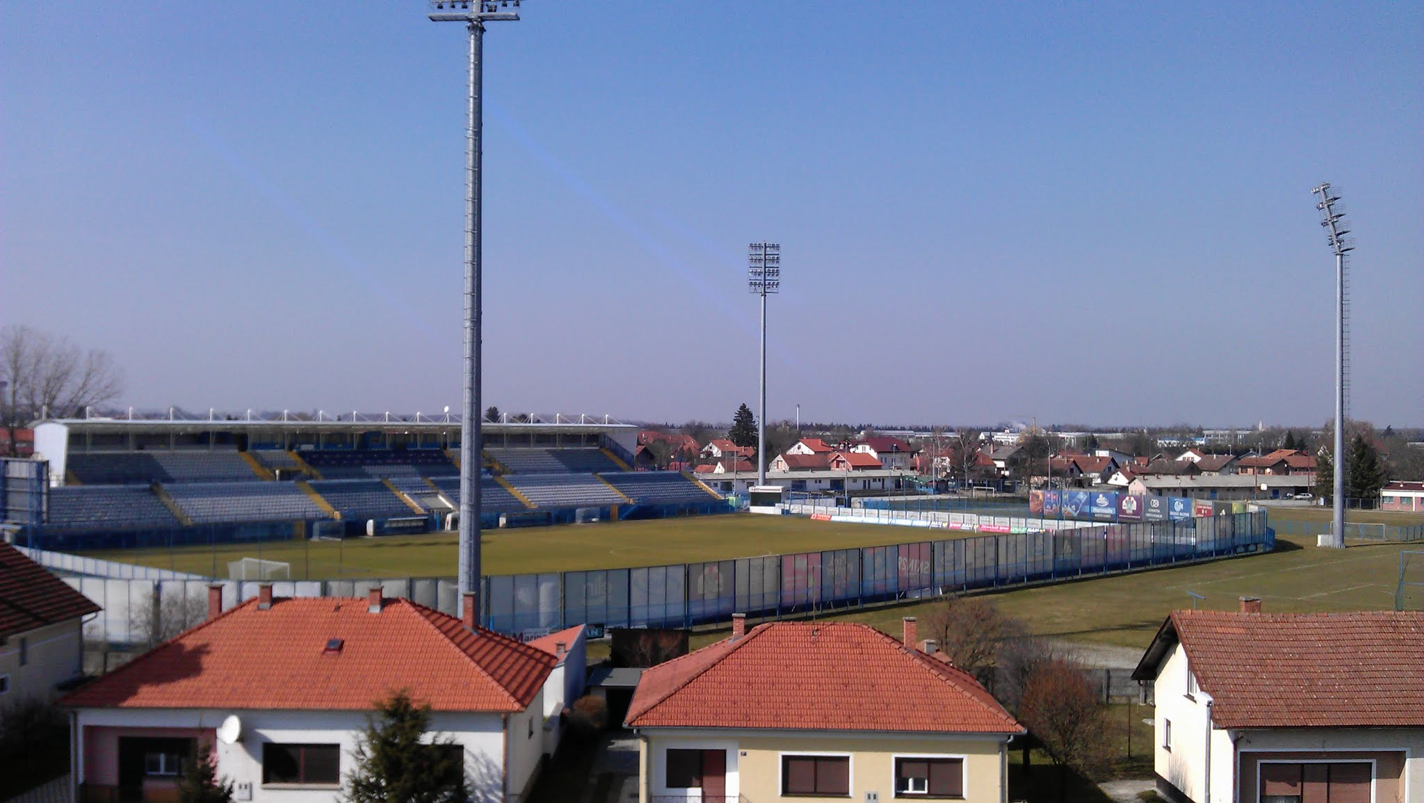 Stadion Slaven Belupa